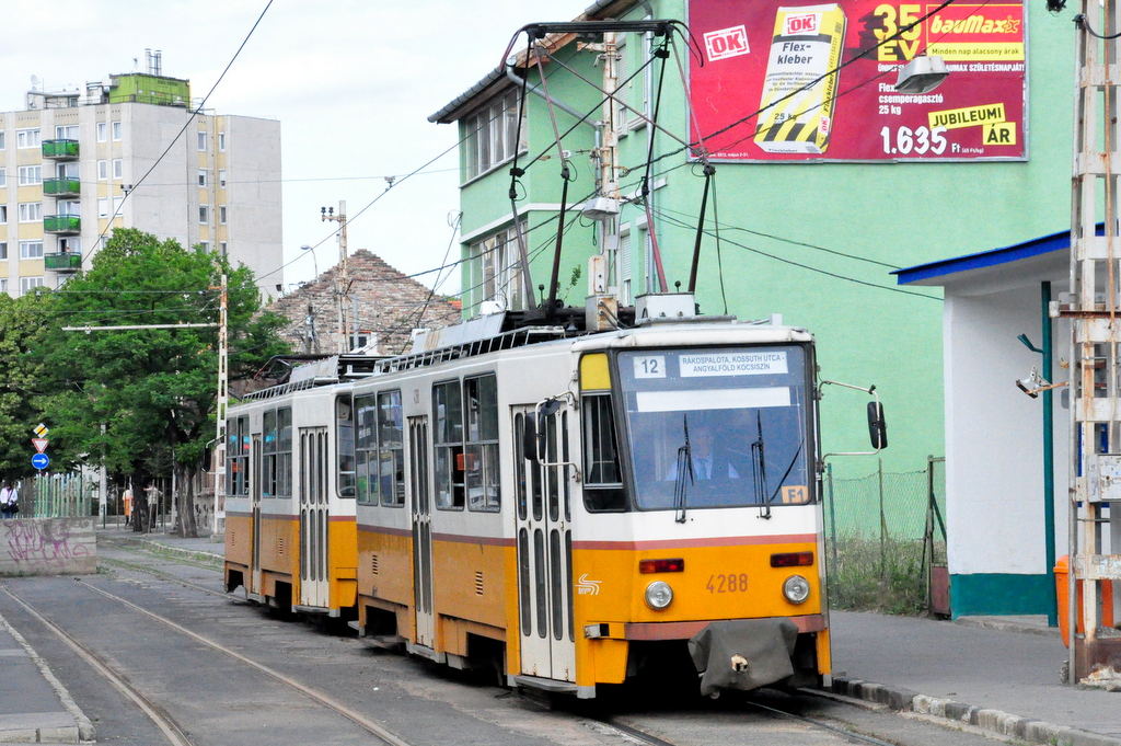 A 12-es villamos a rákospalotai végállomásán